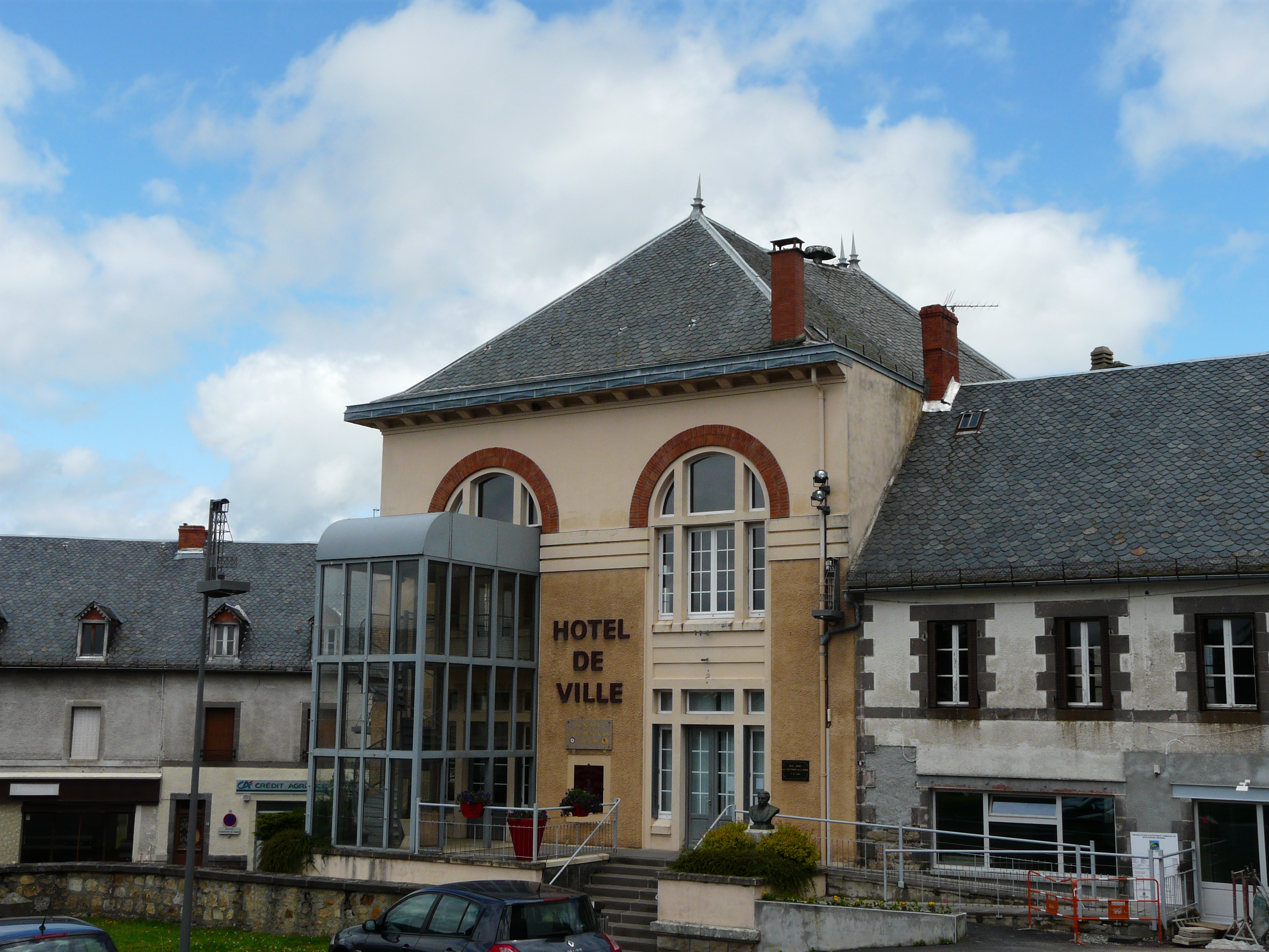 L'Hôtel de ville de Messeix, Puy-de-Dôme, France.